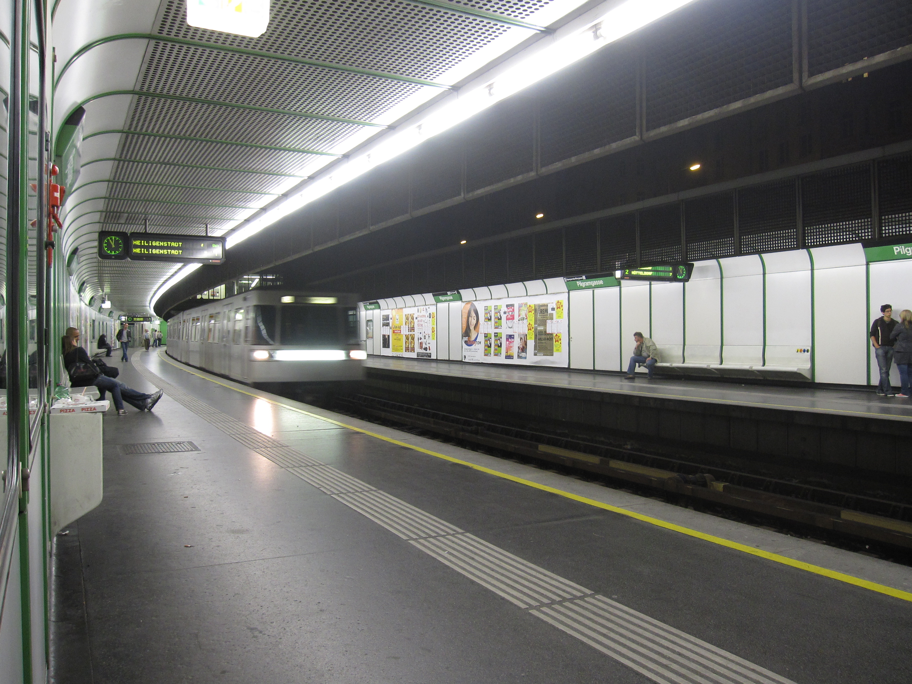 vienna subway